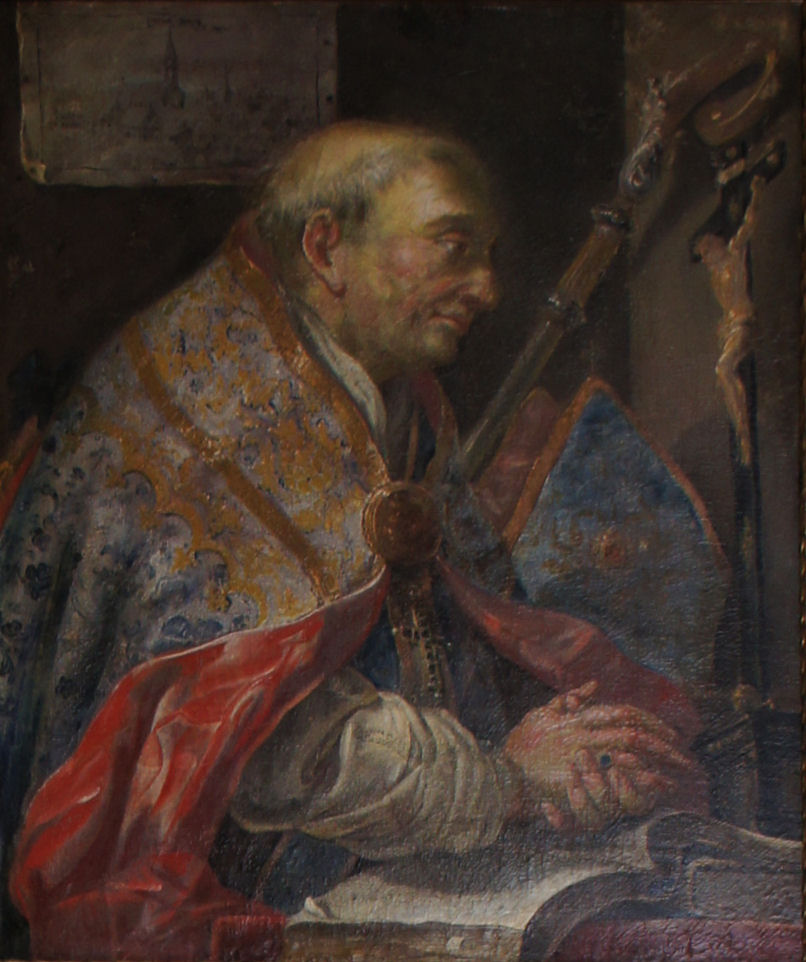 Porträtgemälde von Joseph von Verona, Bischof von Freising, im Fürstengang zwischen Fürstbischöflicher Residenz und Freisinger Dom.